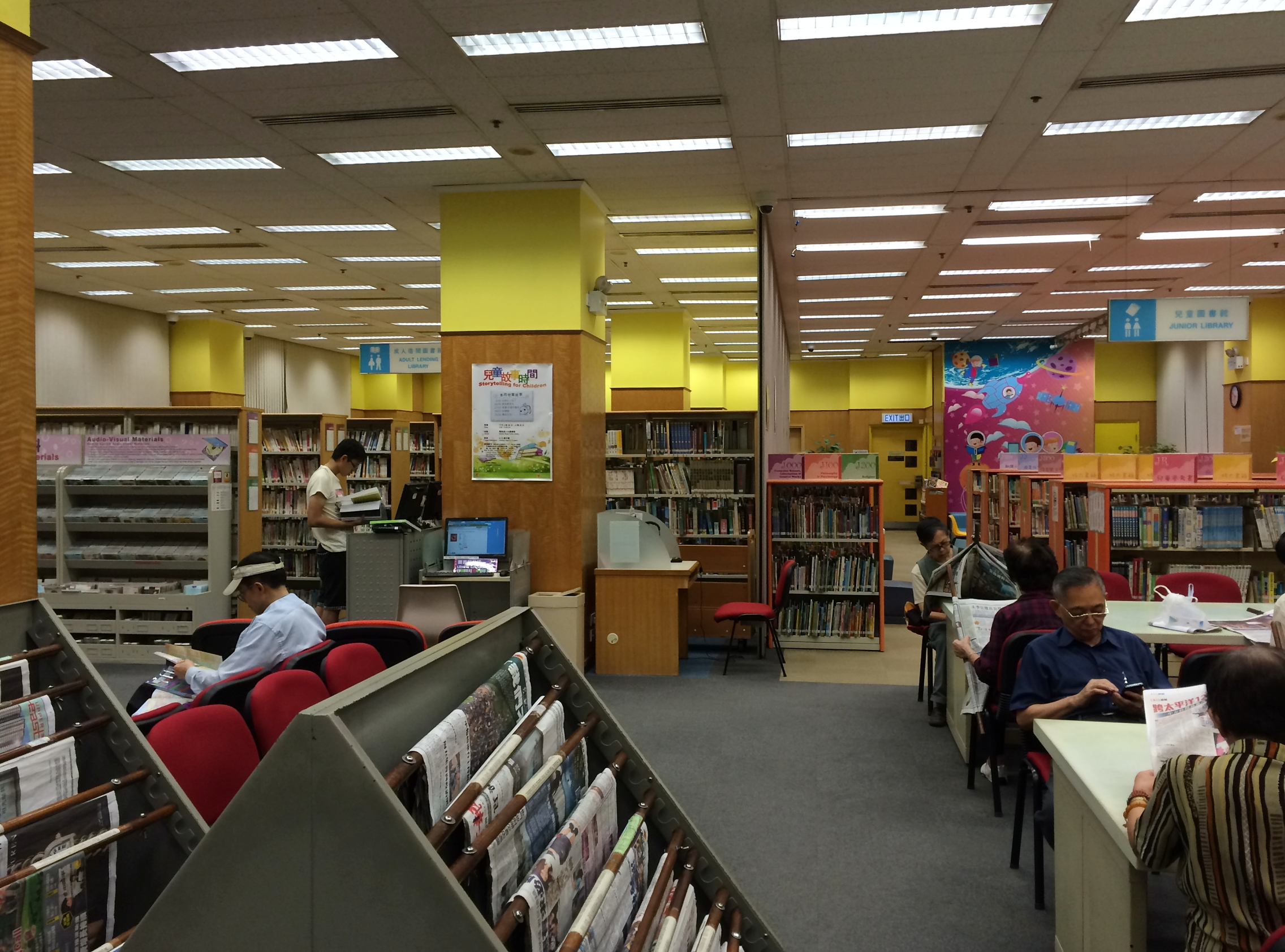 Electric Road Public Library